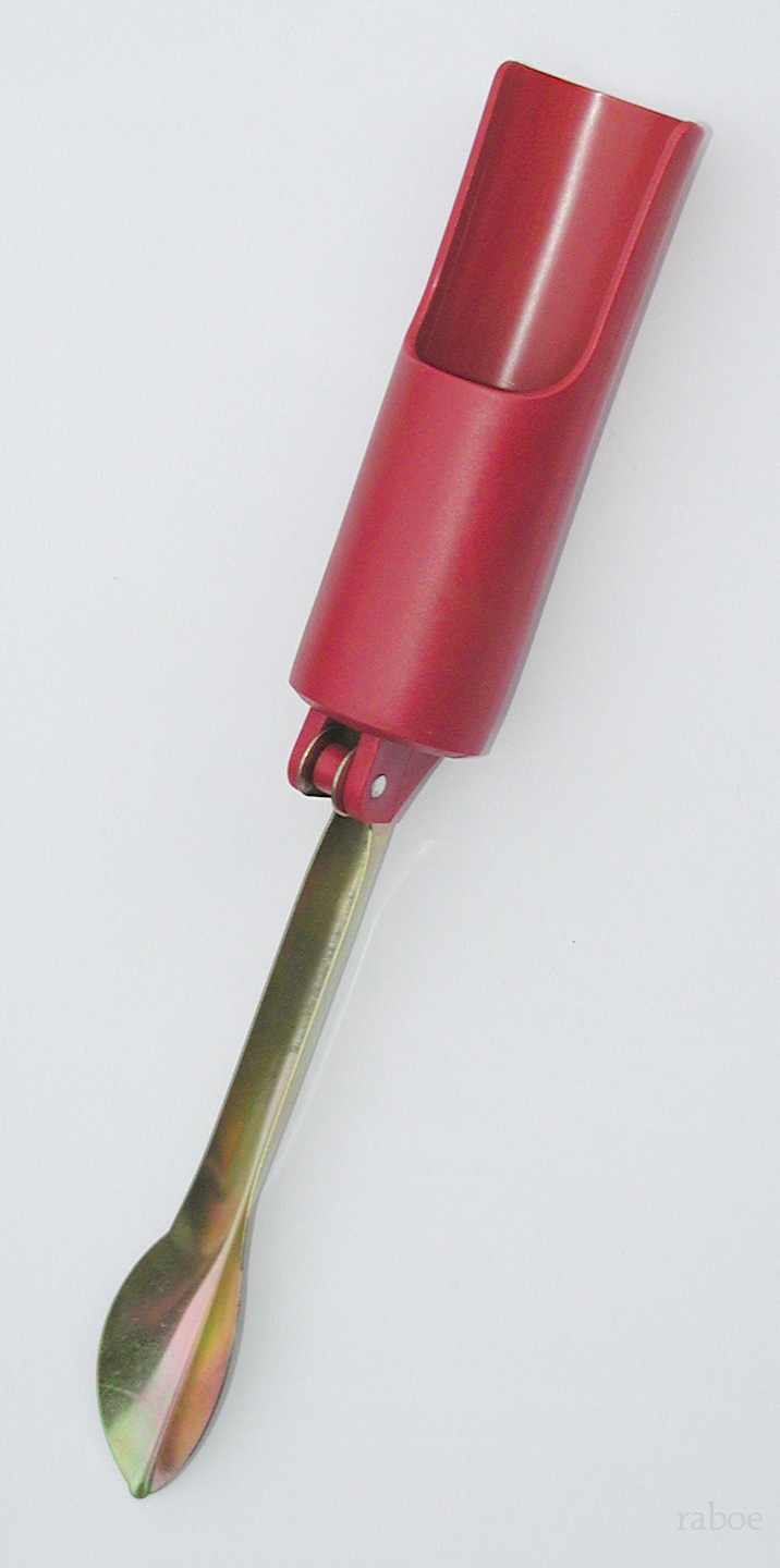 eine Rutenhalter (Angelzubehör)